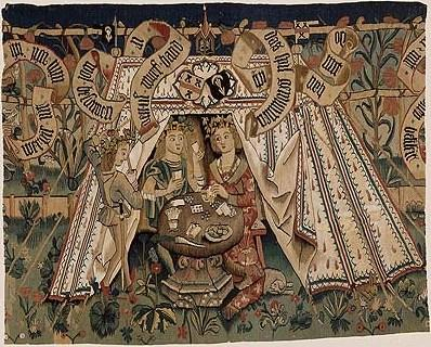 "Liebesgarten mit Zelt", Auftragsarbeit für Nikolaus Meyer zum Pfeil (+ 1500) und seine Frau Barara zum Lufft; Wandbehangs (Wandteppich, Tapisserie): Wollwirkerei, Basel um 1471/1490; mittleres (das Haupt-)Teil von drei Fragmenten: 1. H. 95 x L. 50 51 cm, 2. H. 103 x L. 131 cm, 3. H. 98 x L. 78 cm: In der Hauptszene zeigt der Wandbehang zunächst die sommerliche Muse höfisch gekleideter Leute in einer reichen Gartenlandschaft, deren botanisch erkennbare Blumen in Beziehung zur Liebe und damit auch zum Leid stehen. Ein Hauszelt bietet Schatten. An seiner Stirnseite und auf den beiden Fähnchen sind die Wappen der Basler Geschlechter "zum Lufft" (Barbara zum Lufft) und "Meyer zum Pfeil" (Nikolaus Meyer zum Pfeil) angebracht. Im Raum sitzt auf einer Stabellenbank ein vornehmes Paar am Steintisch beim Kartenspiel. Ein Jüngling sorgt für das leibliche Wohl, indem er in einen Becher gießt. Ein Staufbecher steht neben Fruchtschale und Rettich auf dem Tisch. Mit seiner letzten Karte ergibt sich der junge Mann der Dame mit den Worten: "den. us. wurf. hand. ihr. wohl. besunnen", und sie bestätigt stolz: "Do. mit. han. ich. das. spil. gewunnen".